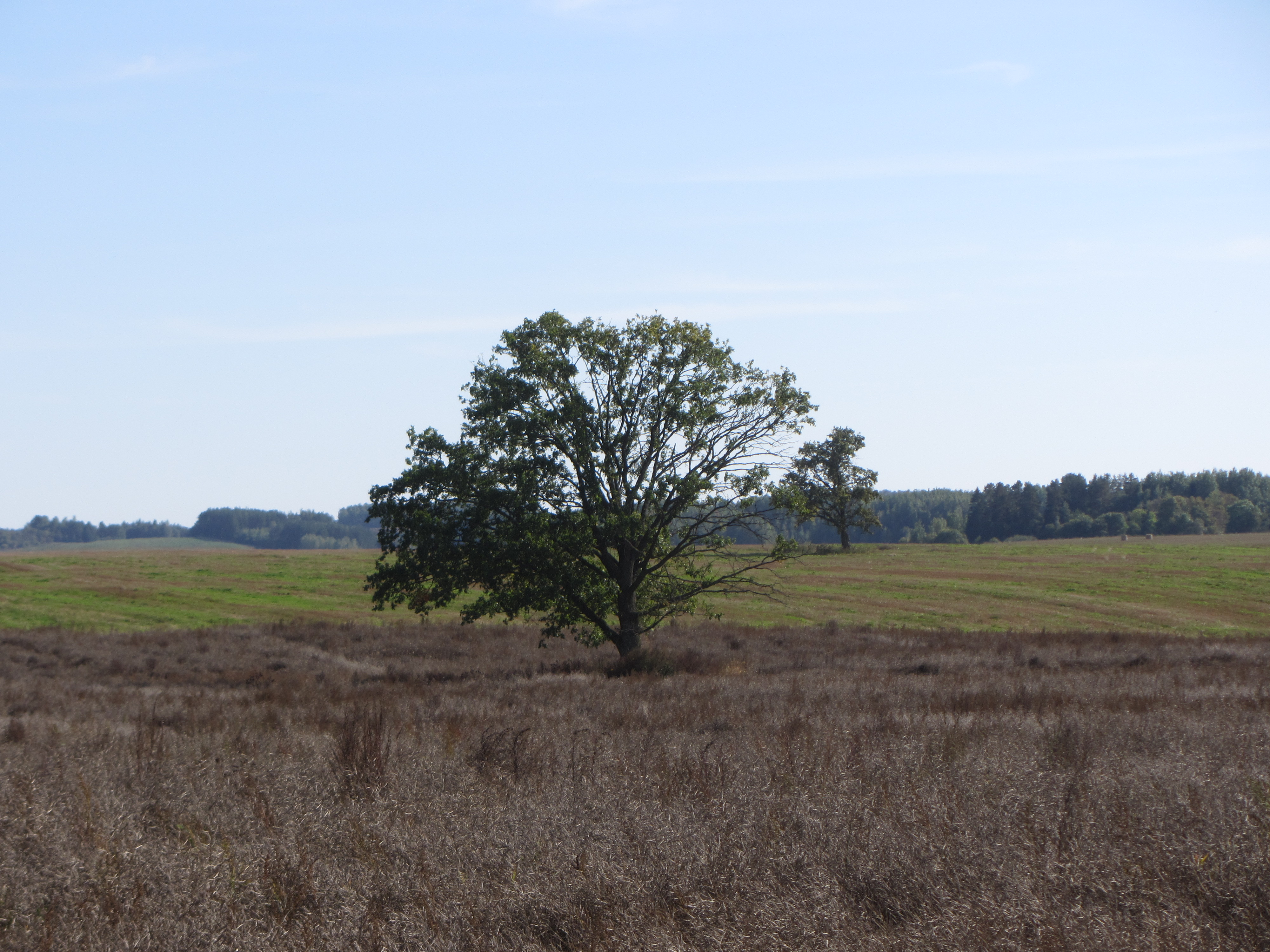 Kazitiškio sen., Lithuania